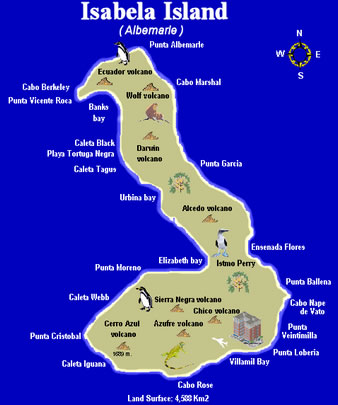 Isabelas sala